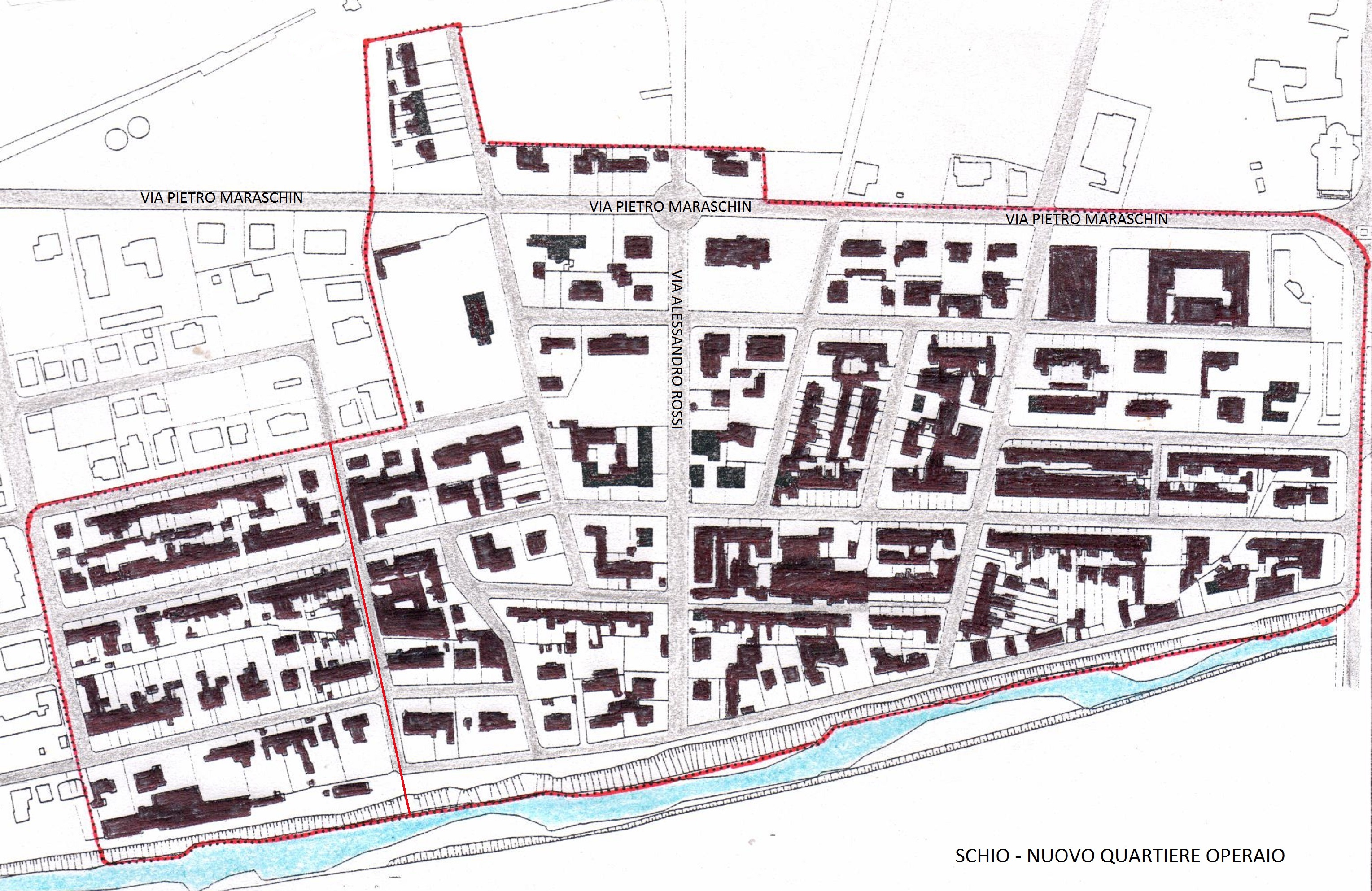 Mappa del quartiere operaio di Schio